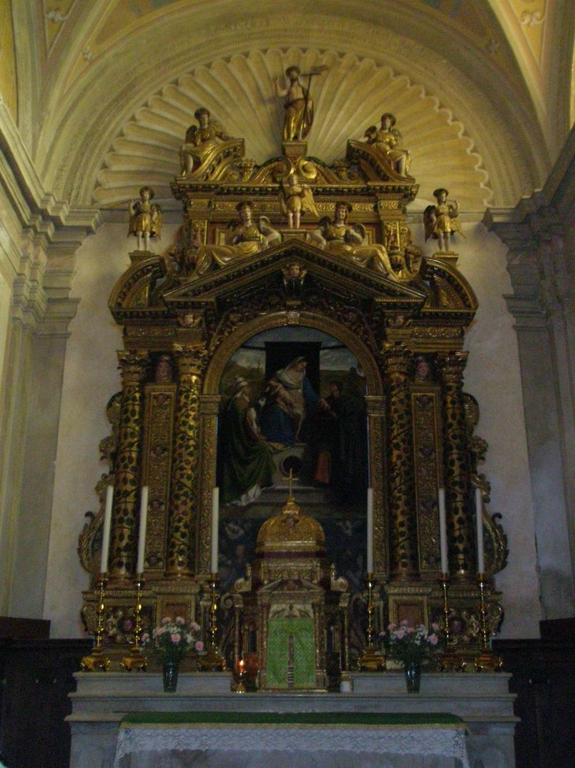 altare ligneo della chiesa di San Gregorio nelle Alpi